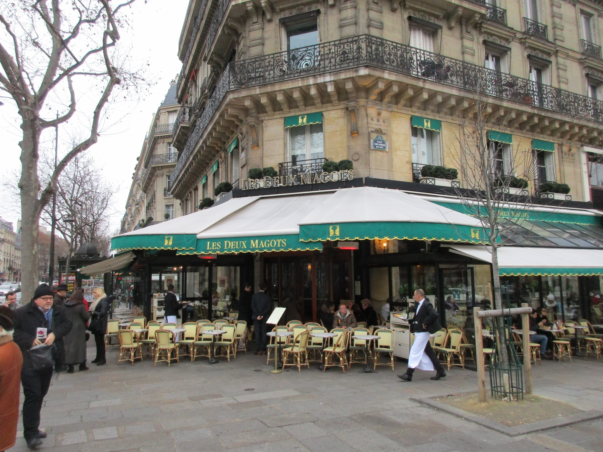 Les Deux Magots